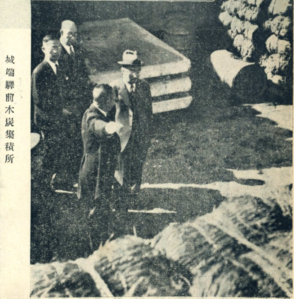 城端駅にて木炭集積場を天覧する昭和天皇